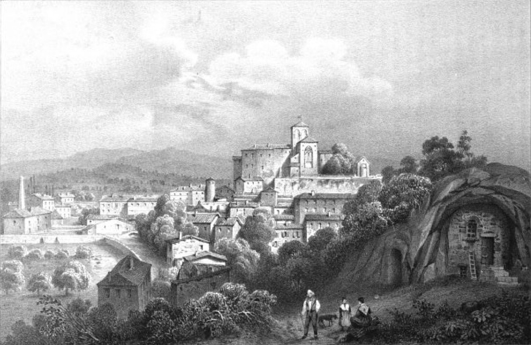 Album du Dauphiné - tome IV, litographie de St Donat, Drome